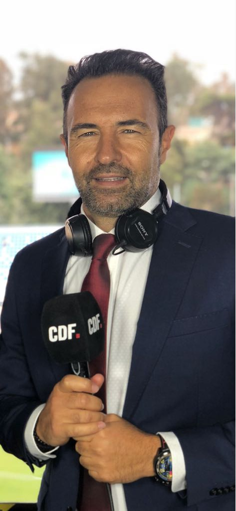 Fotografia tomada el domino 6/5/2018